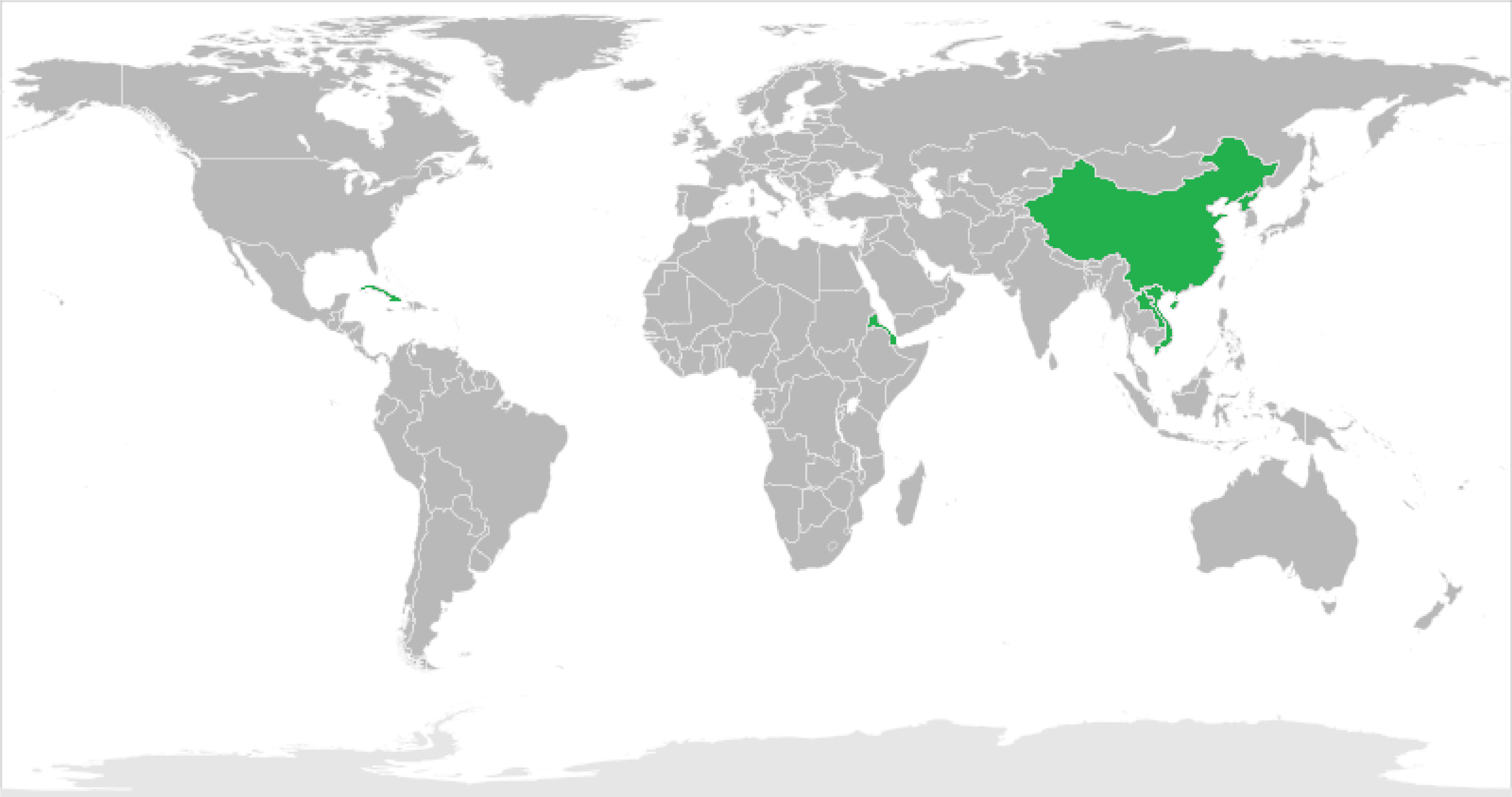 Estados soberanos con solo un partido político